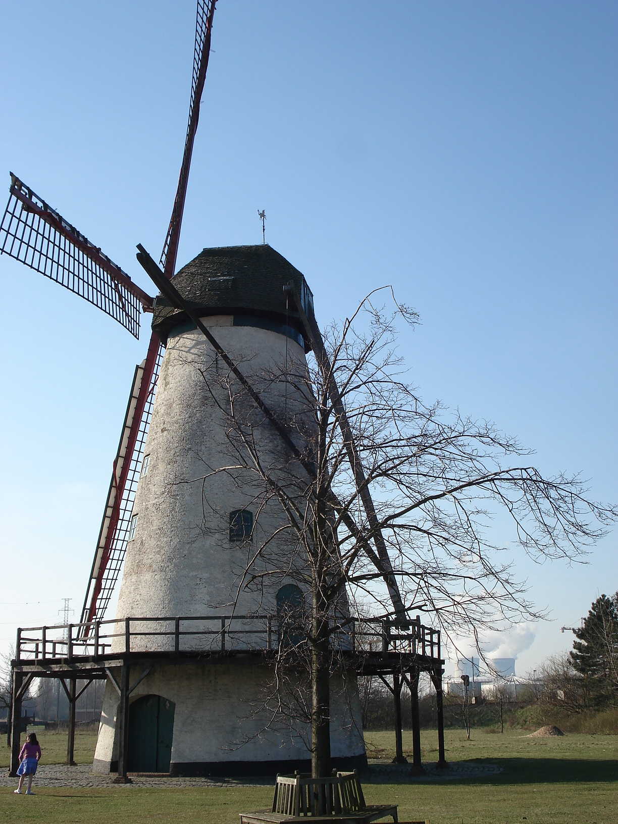 Lillo-Fort, bij Antwerpen: molen De Eenhoorn (of Witte Molen). Op achtergrond rechts: koeltorens kerncentrale Doel.